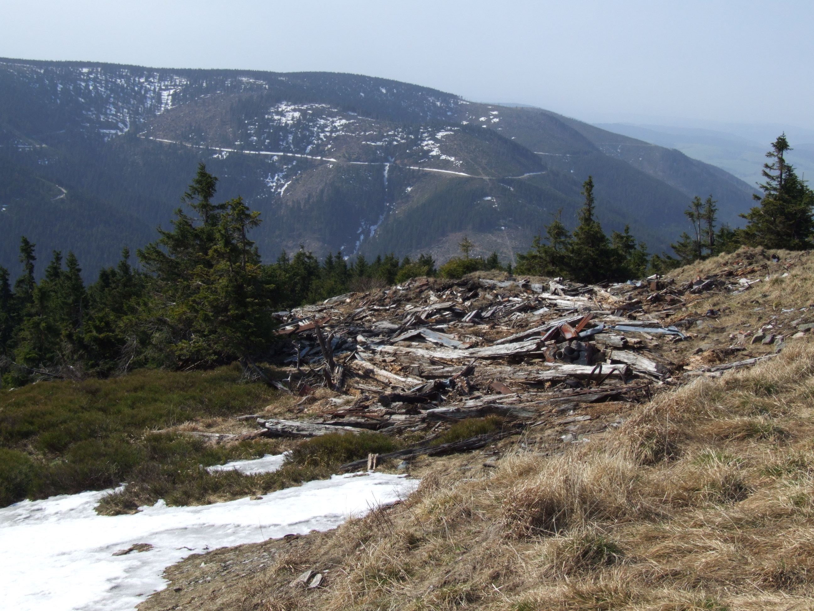 Zbytky Lichtenštejnovy chaty na Králickém Sněžníku, zbořené v roce 1971